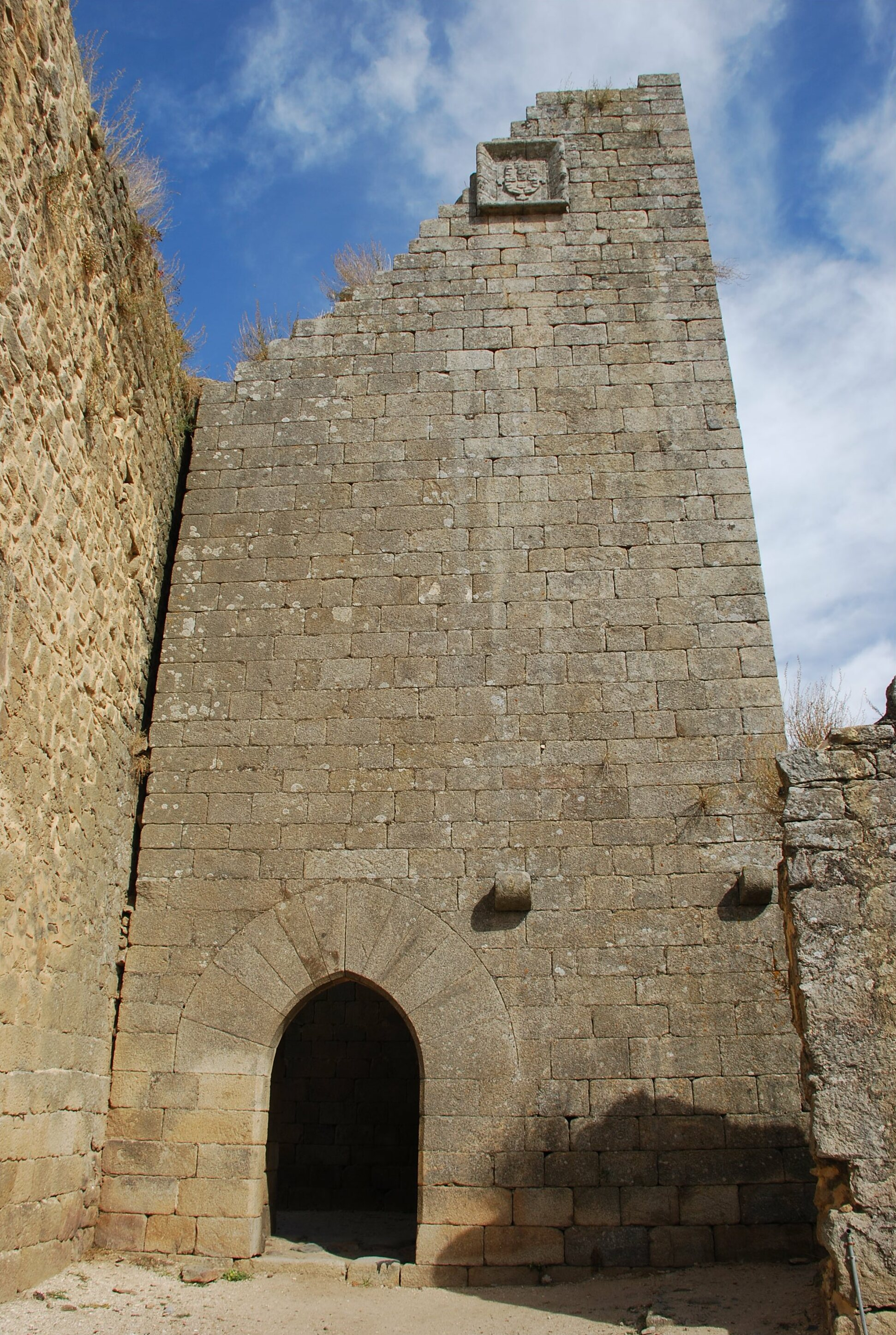 Castillo de Miranda do Douro